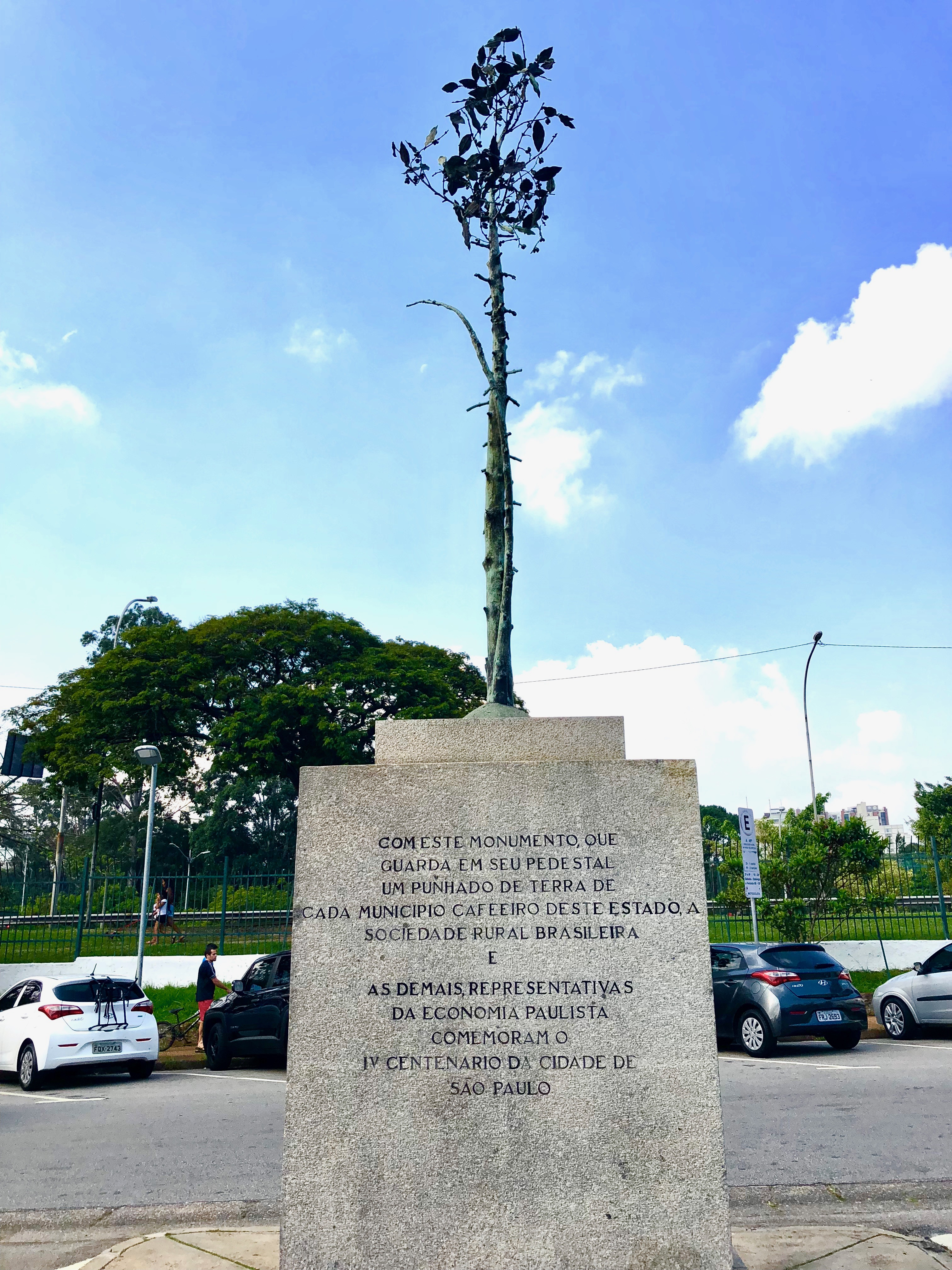 Obra de Francisco Zeri, inaugurada em 1955